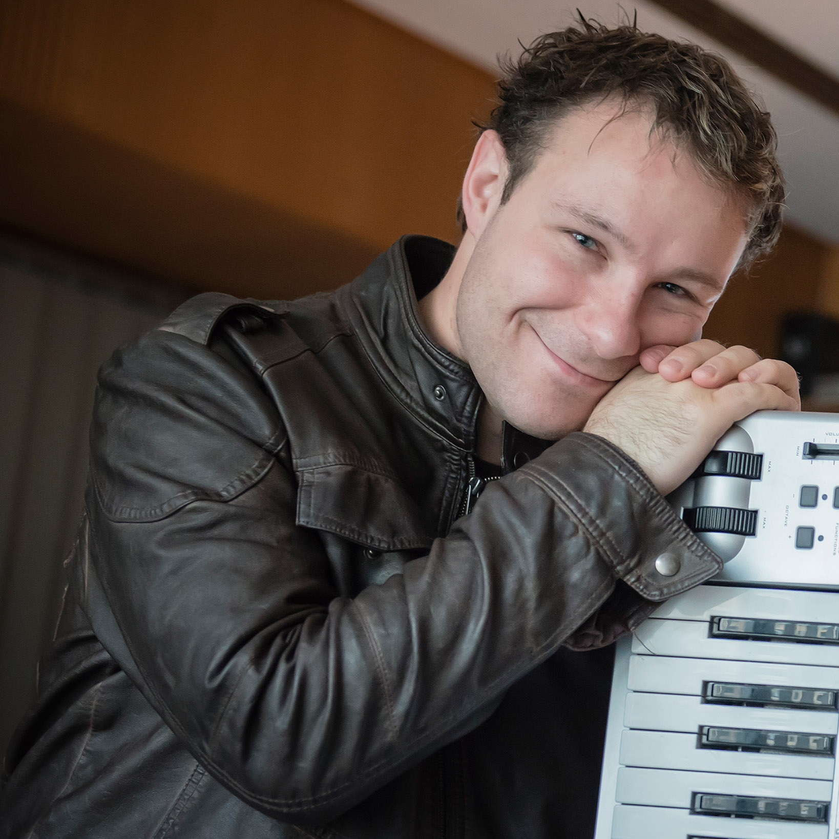 Sascha Ende, deutscher Musiker und Musikproduzent